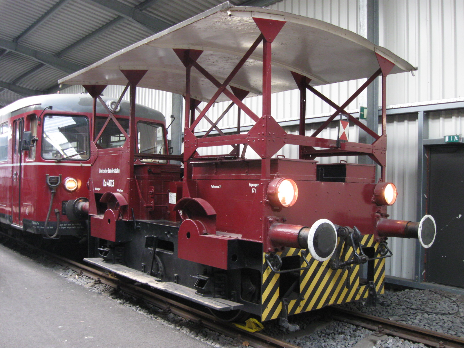 Akku-Kleinlok Ka4013, ausgestellt im Eisenbahnmuseum Bochum-Dahlhausen